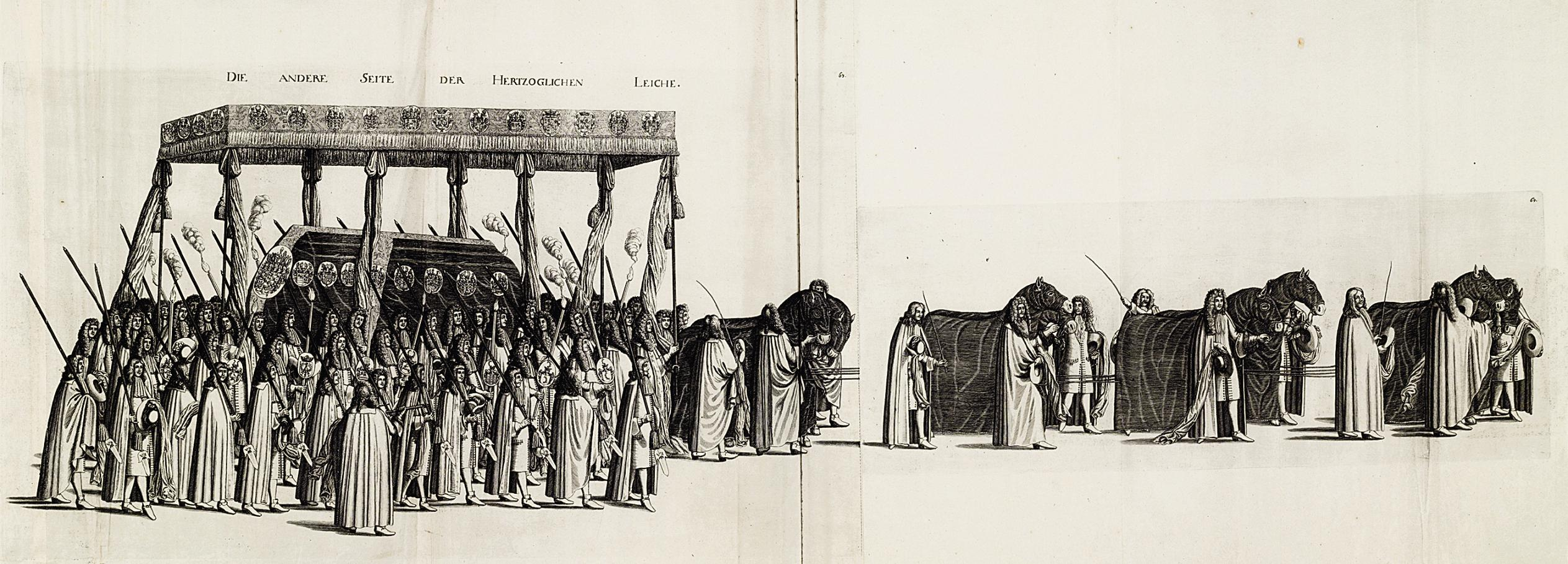 Eines von mehr als 87 Kupferstichen anlässlich der nach katholischem Ritus ausgeführte Bestattungs-Zeremonie für den am 21. April 1680 in der Fürstengruft des Leineschlosses in Hannover beigesetzten Herzog Johann Friedrich von Braunschweig-Lüneburg. Der hier als Doppelseite übertitelte Stich „DIE ANDERE SEITE DER HERZOGLICHE LEICHE“ zeigt den von Baldachin-Trägern umringten Sarg des verstorbenen Monarchen hinter acht mit schwaren Decken verhängten Zug-Pferden. Das Gesamtwerk mit dem Titel „Iusta Funebria Serenissimo Principi Joanni Friderico Brunsvicensium Et Luneburge: Duci A Revermo Et Sermo Fratre Ernesto Augusto Episcopo Osnabrugensi Duci Brunsv: Et Luneb. Persoluta“ erschien 1685 bei dem Fürstllich Hessen-Schauenburgischen Universitäts bestallten Buchdrucker Gottfried Kaspar Wächter in den Maßen 446 x 310mm. Der hier gezeigte Stich stammt aus der Provenienz des braunschweig-lüneburgischen Staatsmannes Otto Grote datiert März 1690 mit einer Geschenk-Inschrift für die Universität Helmstedt. Auch zwei Tinten-Stempel der Herzog August Bibliothek in Wolfenbüttel, darunter ein Ausgangs-Stempel gehört zu dem Lot, für das das Auktionshaus Christie’s um 2010 zunächst einen Schätzpreis von 2.500 bis 3.500 GBP ausrief und dann den Zuschlag bei 4.000 GBP erteilte.